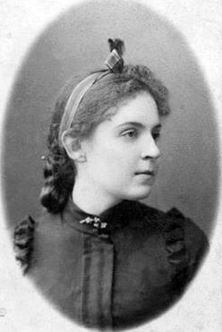 Оксана Старицька (за чоловіком - Стешенко), 1891 р.